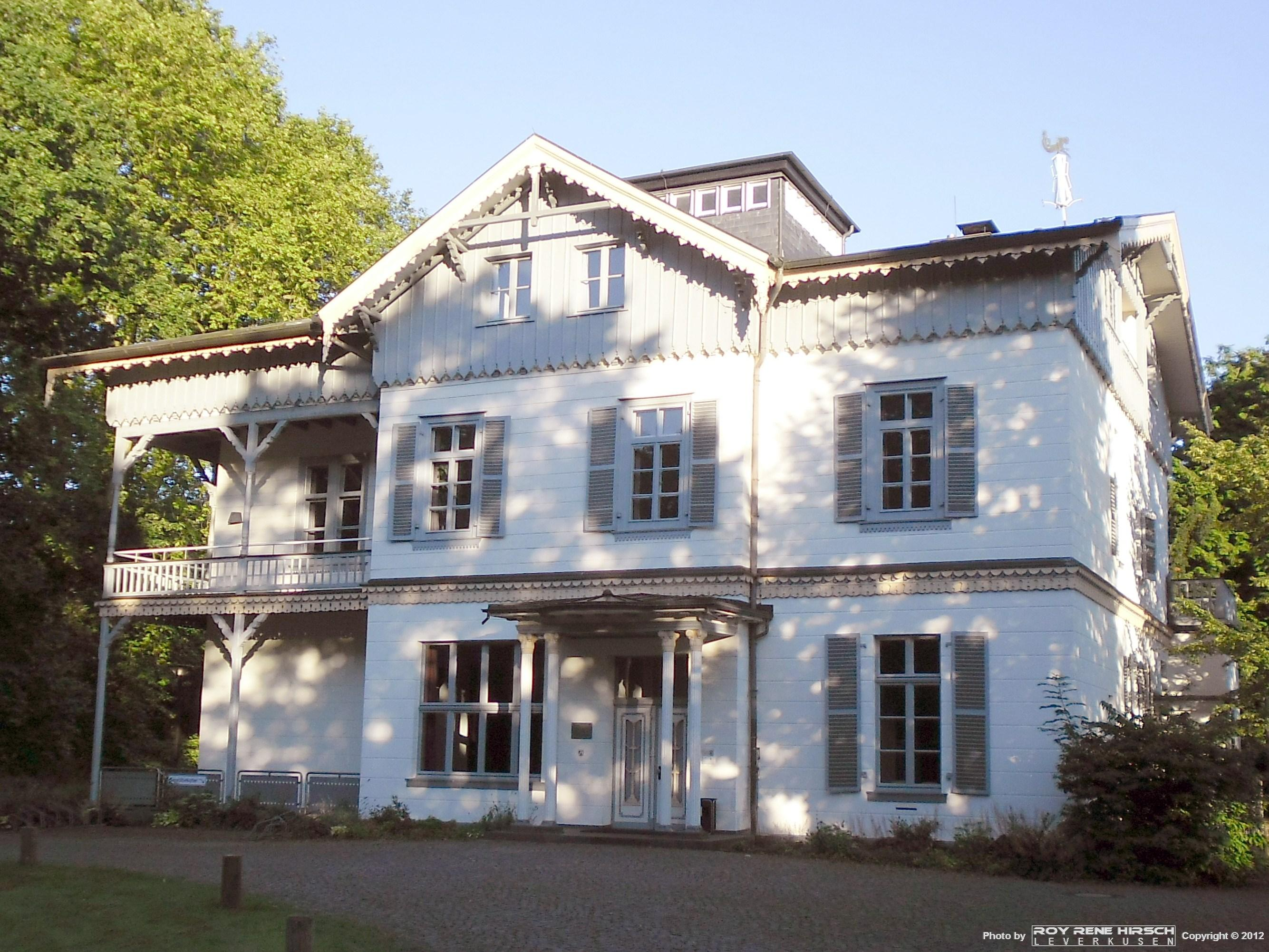 Baudenkmal: Leverkusen-Schlebusch, Villa Wuppermann.